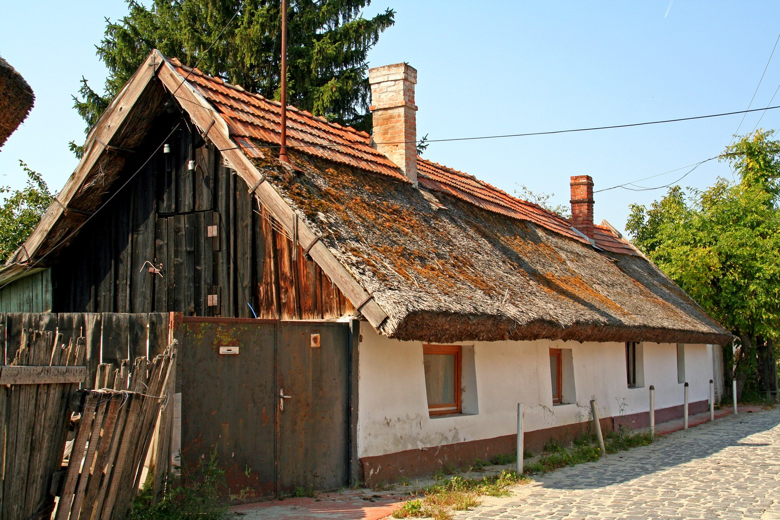 Halászház (Csongrád, Gyökér u. 6 .) This is a photo of a monument in Hungary, Identifier: 3331